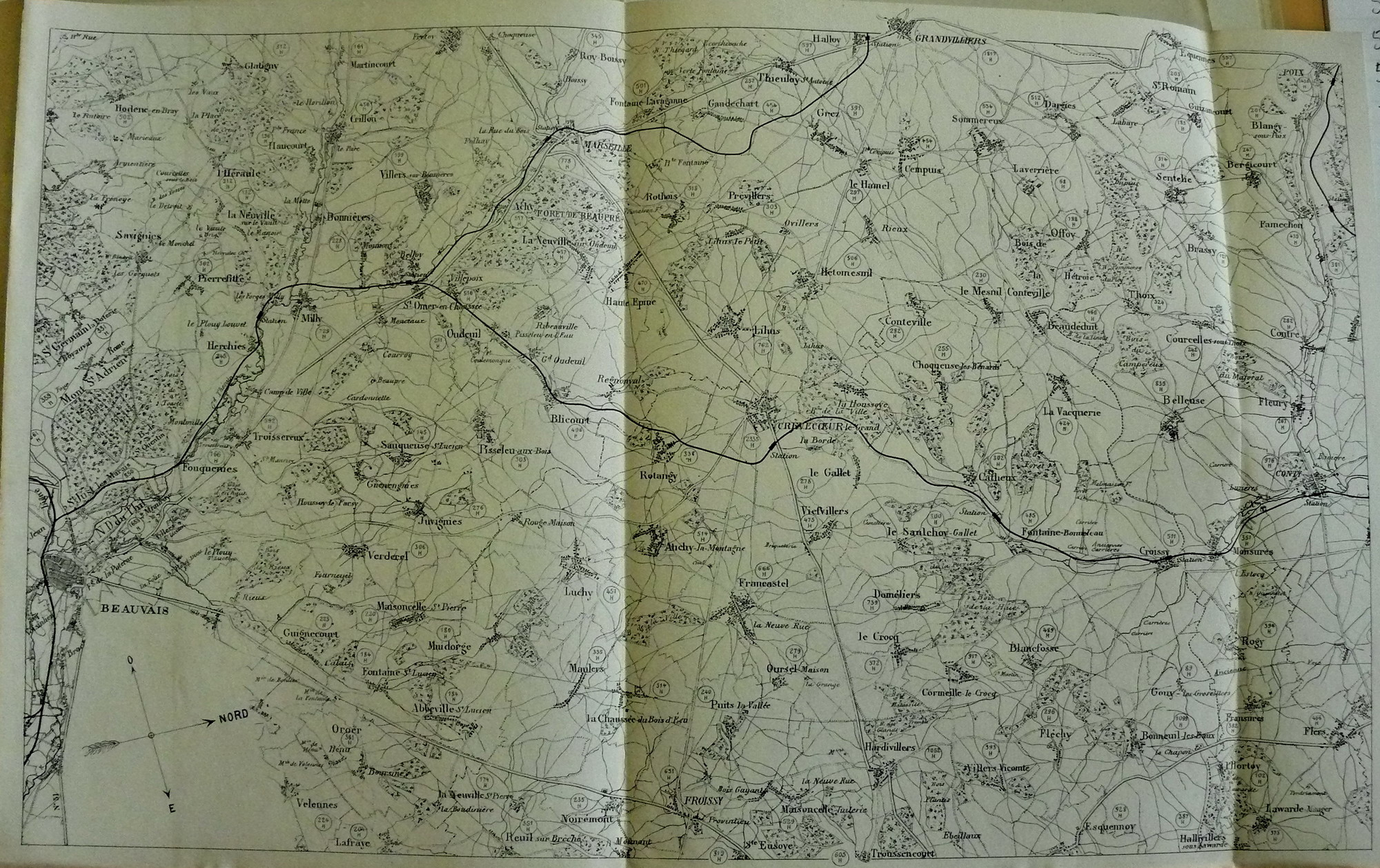 Ligne Beauvais - Amiens : plan du projet d'implantation des stations